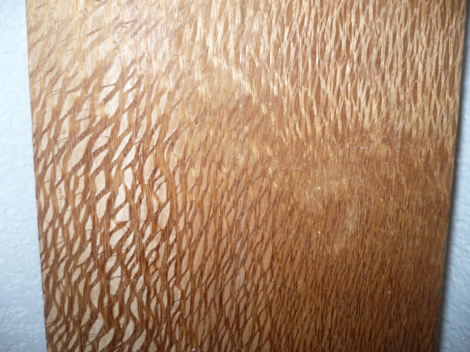 lacewood